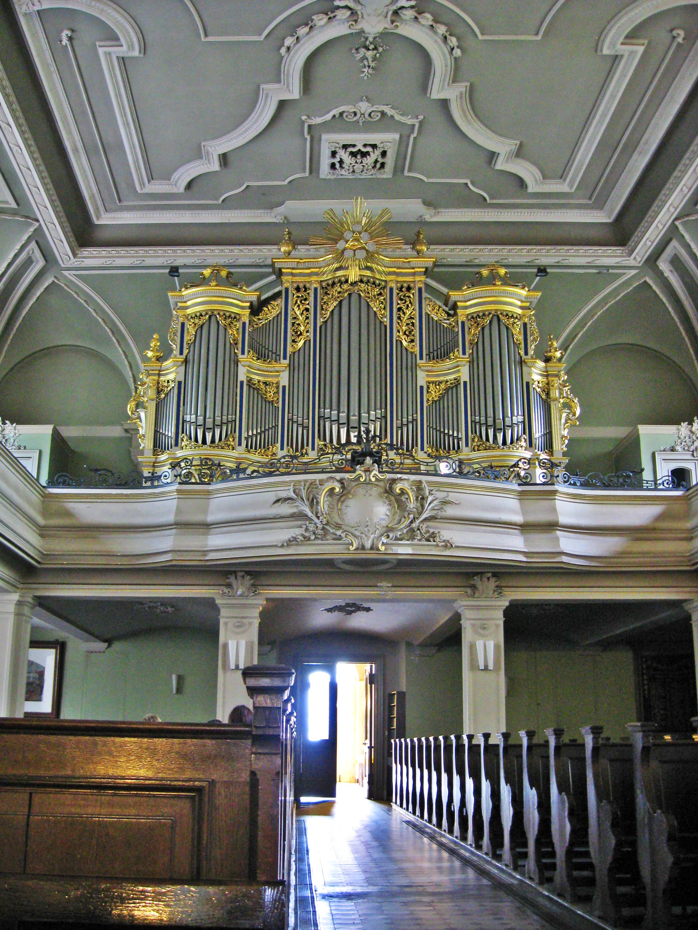 Orgel der Sophienkirche in der Sophienstraße in Berlin